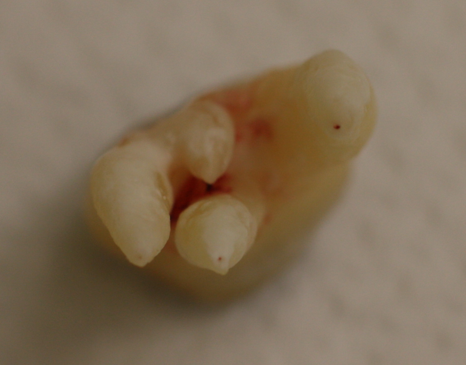 Weisheitszahn, das Foramen apicale ist deutlich zu erkennen